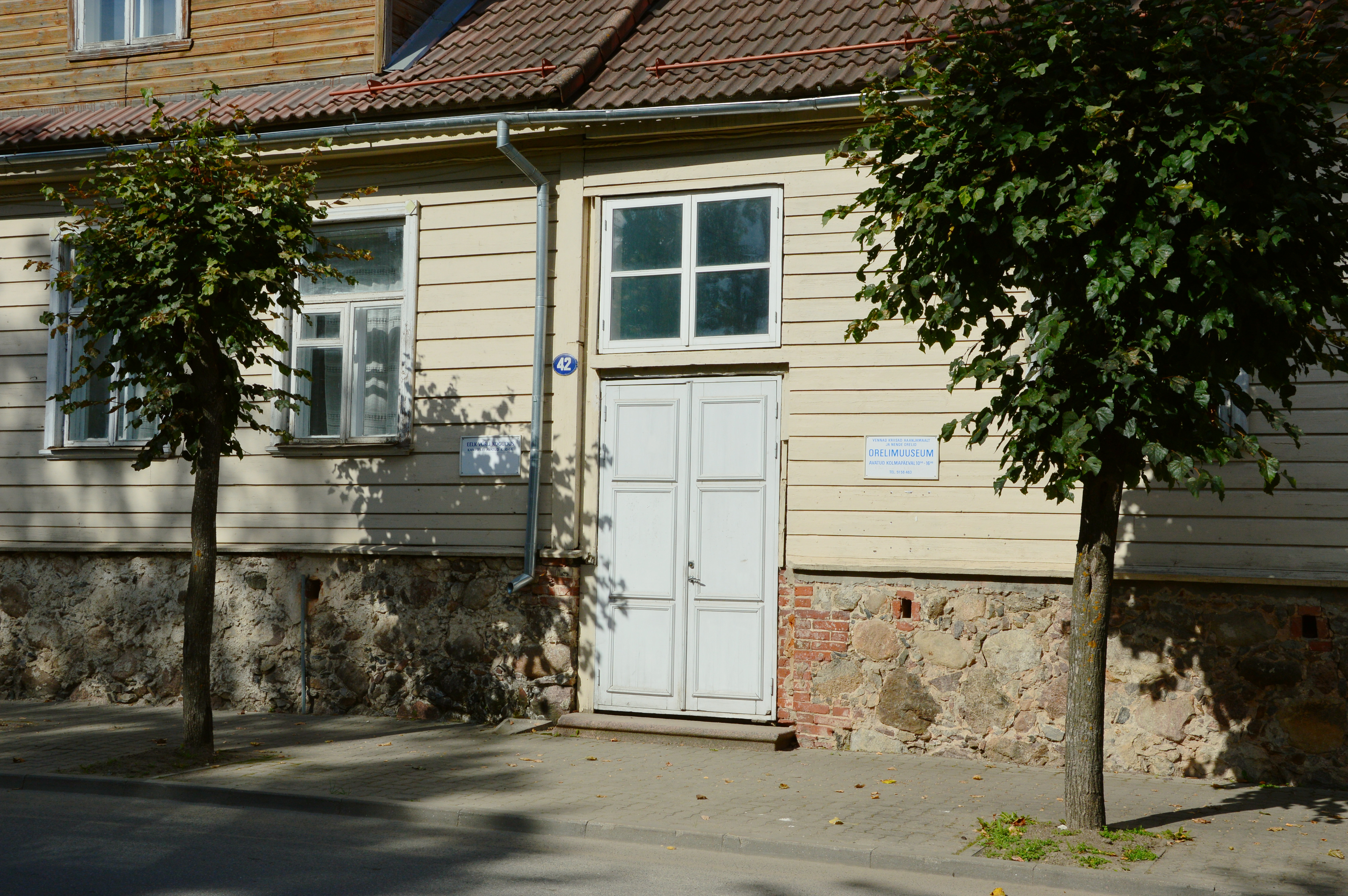 Orelimuuseum Võrus